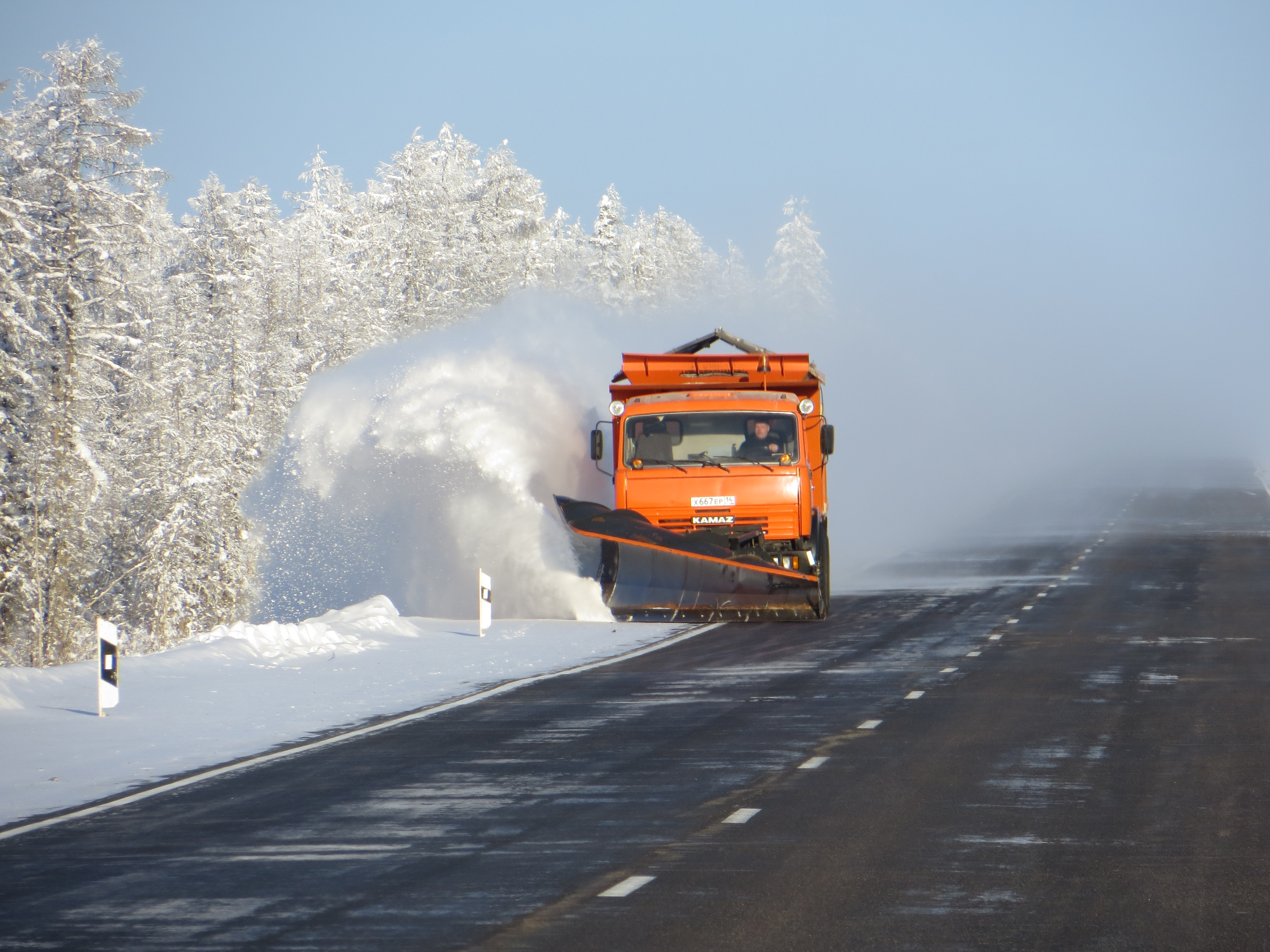 Зимнее содержание автодороги "Лена", очистка обочин от снега КДМ